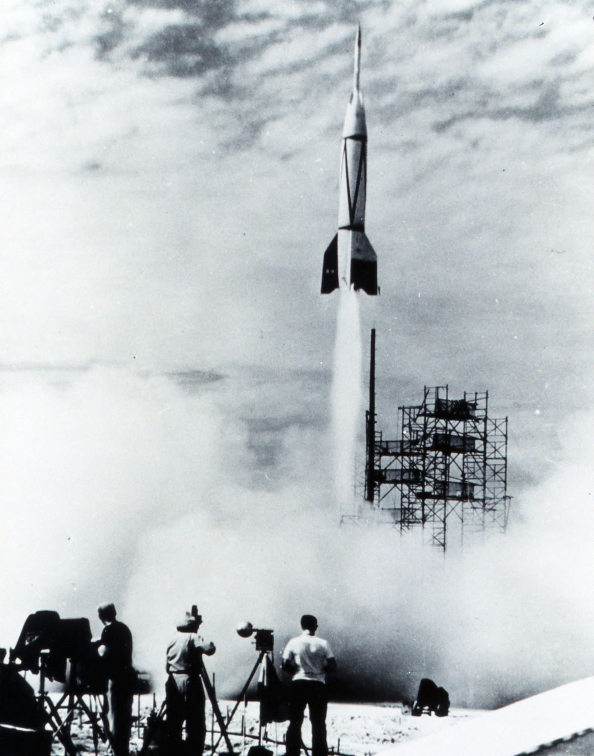 spac0027, NOAA in Space Collection von: (Original text: A V-2 missile being launched - these missiles were used for early upper atmosphere studies.) Image ID: spac0027, NOAA in Space Collection Location: Air Force Eastern Test Range Photo Date: 1950 July 24 Bei diesem Bild handelt es sich allerdings um den Launch des Projektes "Bumper", der ersten Stufenrakete (eine A4 transportiert eine WAC Corporal). MikeTheGuru 19:45, 15. Mai 2004 (CEST)